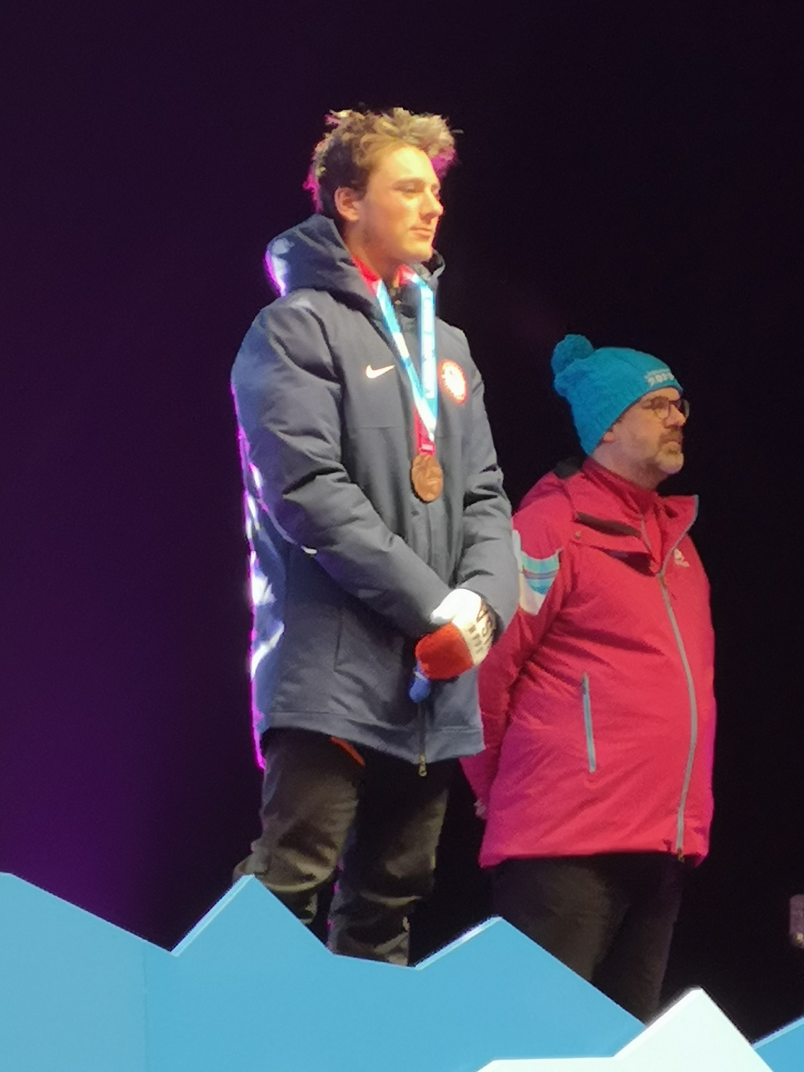 Will Koch pendant la cérémonie de remise des médailles du 10 km masculin de ski de fond des JOJ de Lausanne 2020.